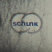 Logo anterior da Schunk GmbH & Co. KG, gravado em peça no tejadilho de um elétrico “remodelado” de Lisboa. Note-se "un" como "տ".